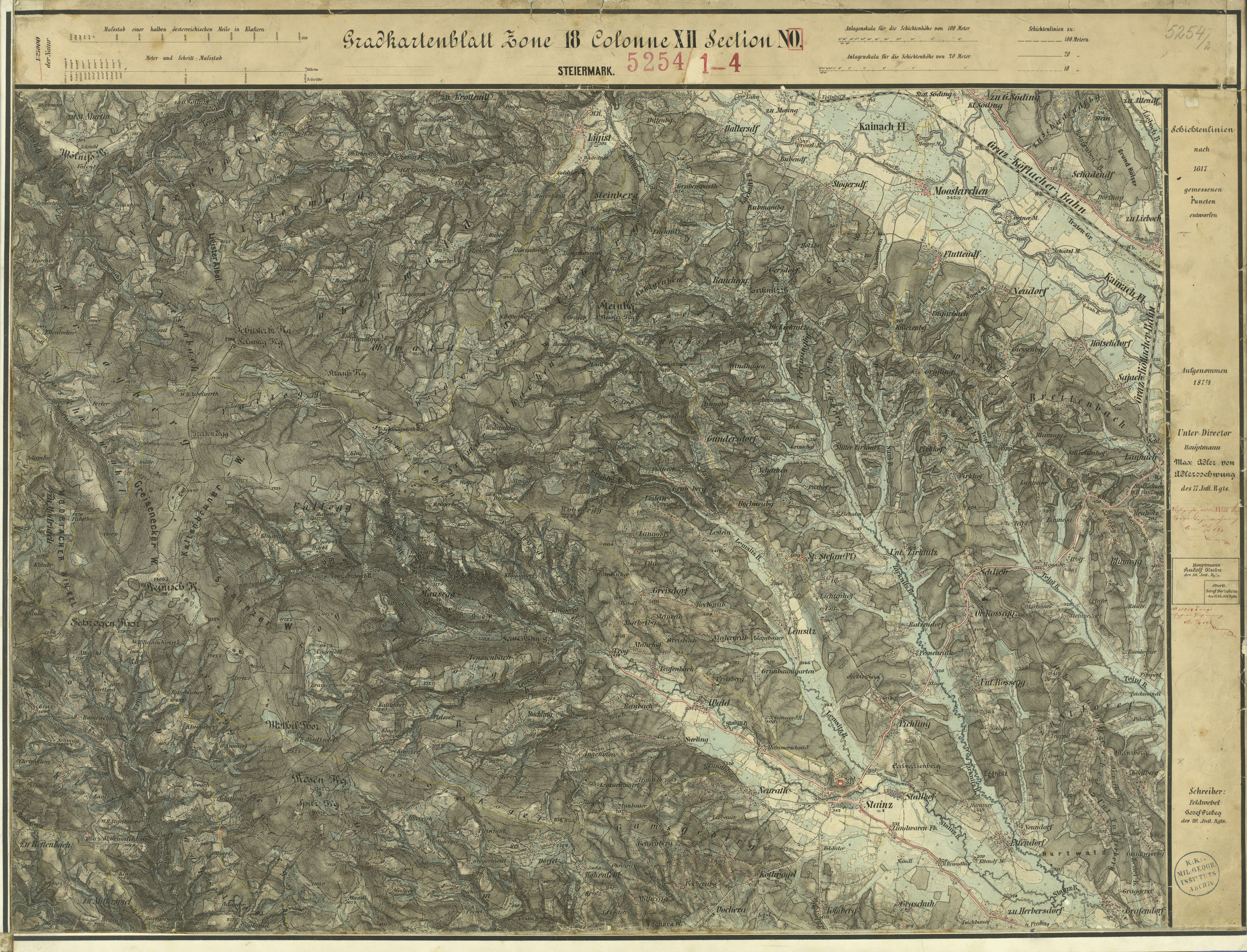 historische Landkarte: Gradkartenblatt Zone 18 Colonne XII Section NO (später 5254/2). Franzisco-josephinische (3.) Landesaufnahme der österreichisch-ungarischen Monarchie. Aufnahmeblatt 1:25.000. Aufgenommen 1877/78